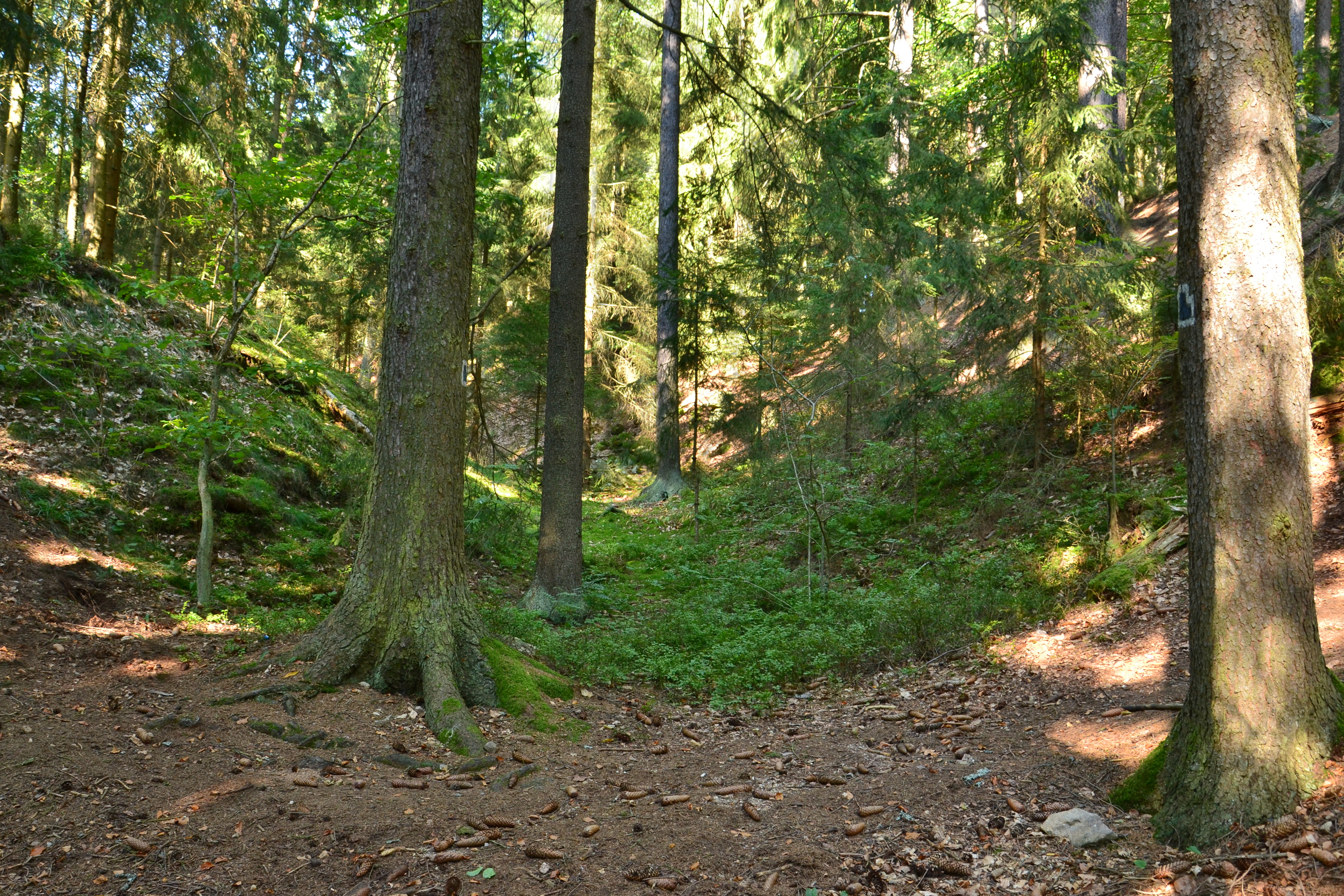 Severovýchodní část příkopu